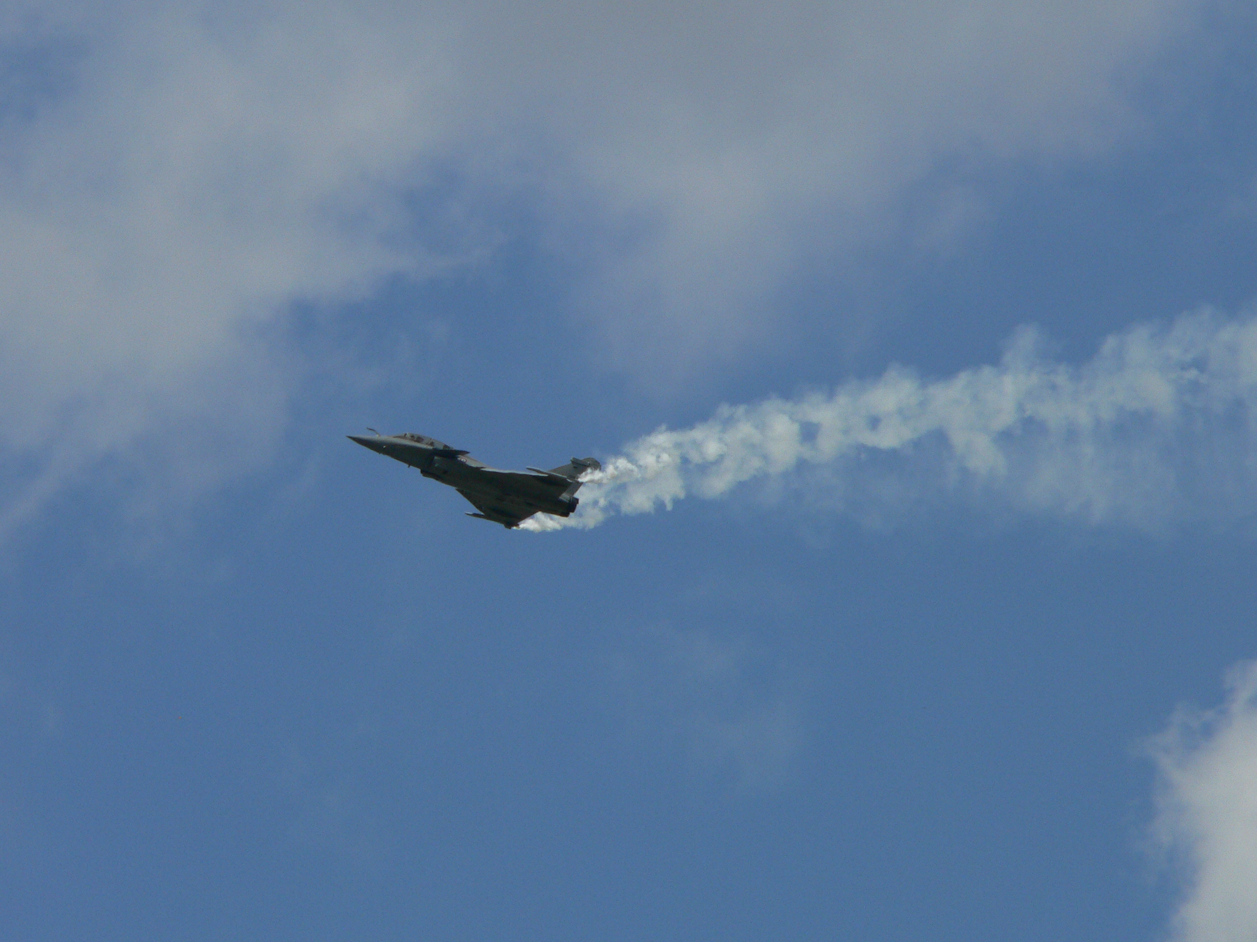 Dassault Rafale